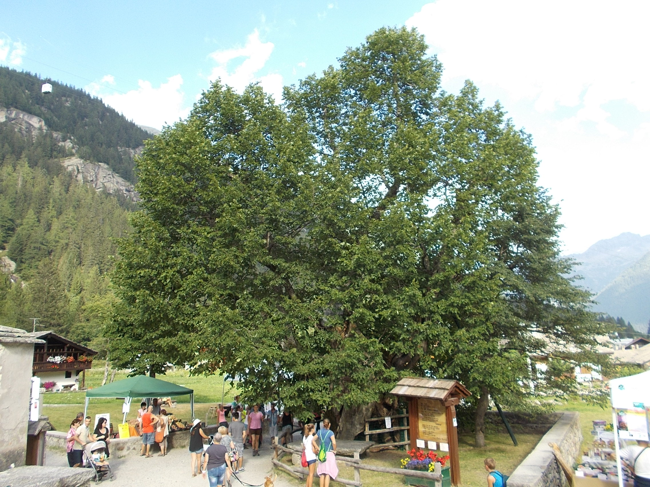 Vecchio tiglio frazione Chiesa Vecchia Macugnaga This is a photo of a monument which is part of cultural heritage of Italy.